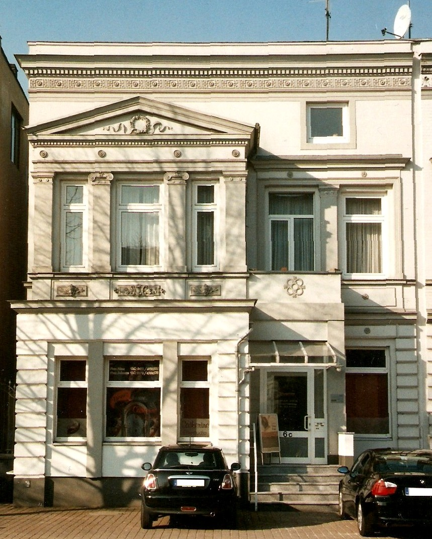 Alterswohnsitz von Louis Riedel